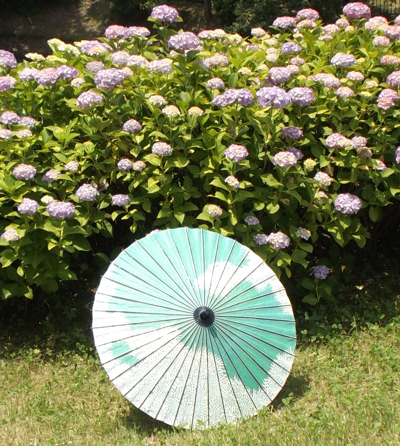 香川県高松市でつくられている日傘